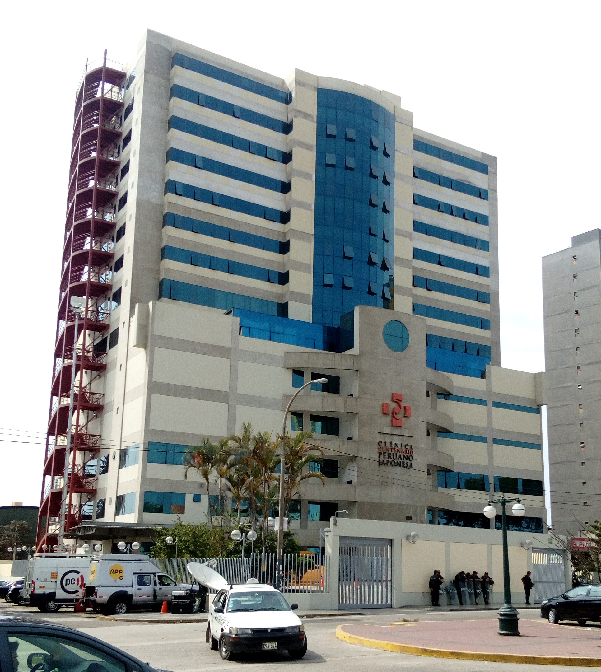 La Clínica Centenario Peruano Japonesa, ubicada en el distrito de Pueblo Libre.